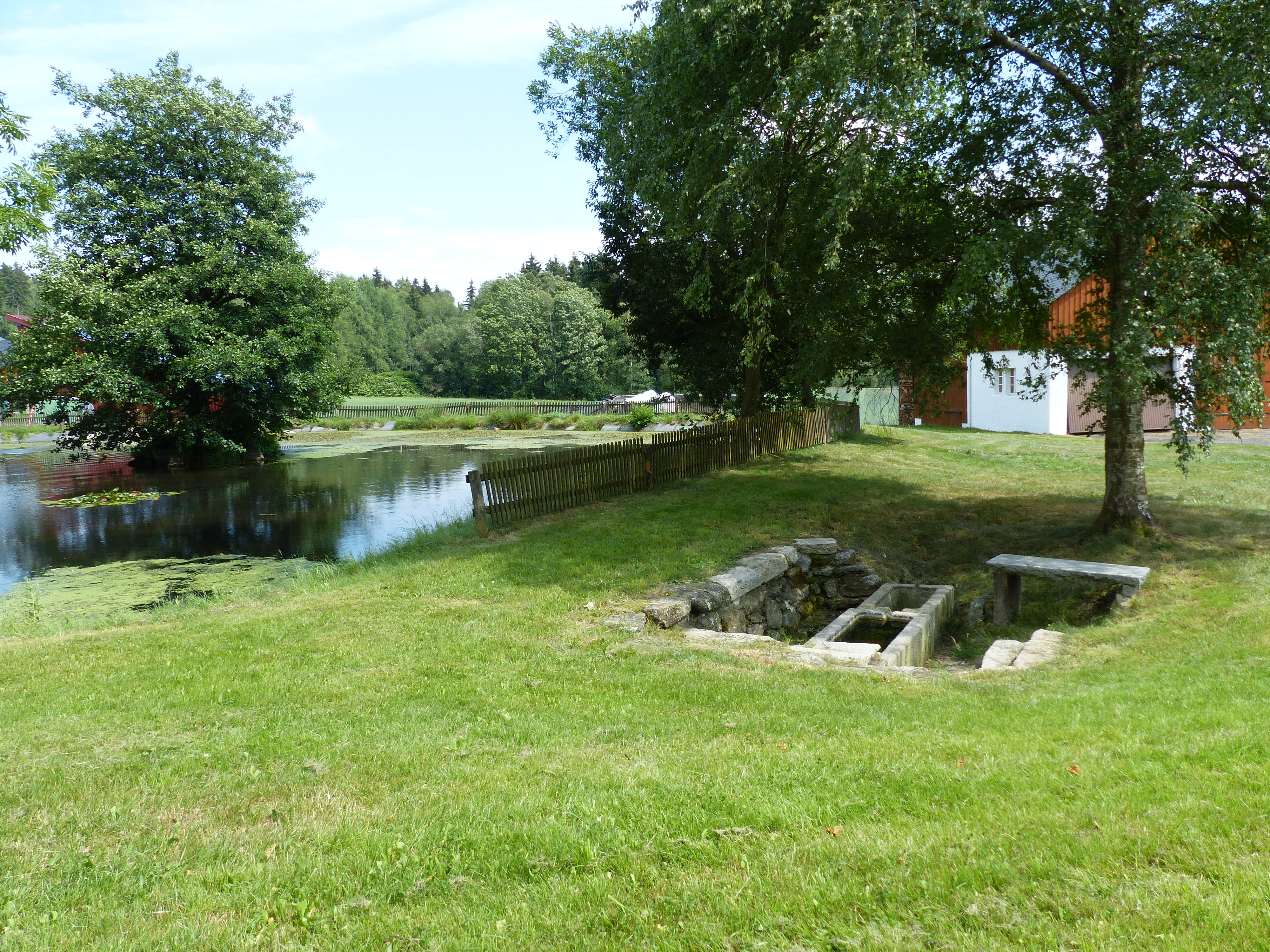 Bauwerk in der Stadt Weißenstadt